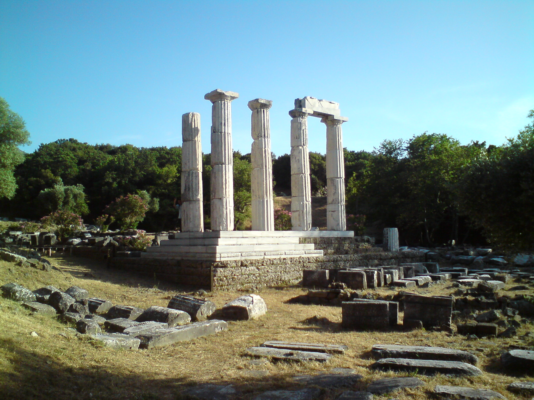 Αρχαιολογικός χώρος Παλαιοπόλεως«Αρχαιολογικός χώρος Παλαιοπόλεως»